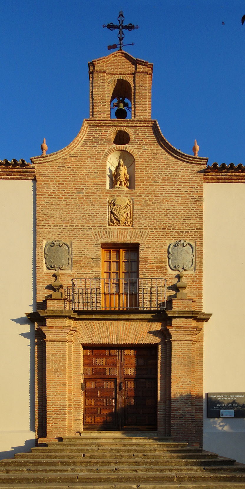 Pórtico del Real Hospital de Mineros de San Rafael, edificio construido entre 1755 y 1773, en Almadén (Provincia de Ciudad Real - España). Actualmente es la sede del Archivo Histórico de Minas de Almadén, de la Fundación Almadén-Francisco Javier de Villegas y del Museo del Minero.